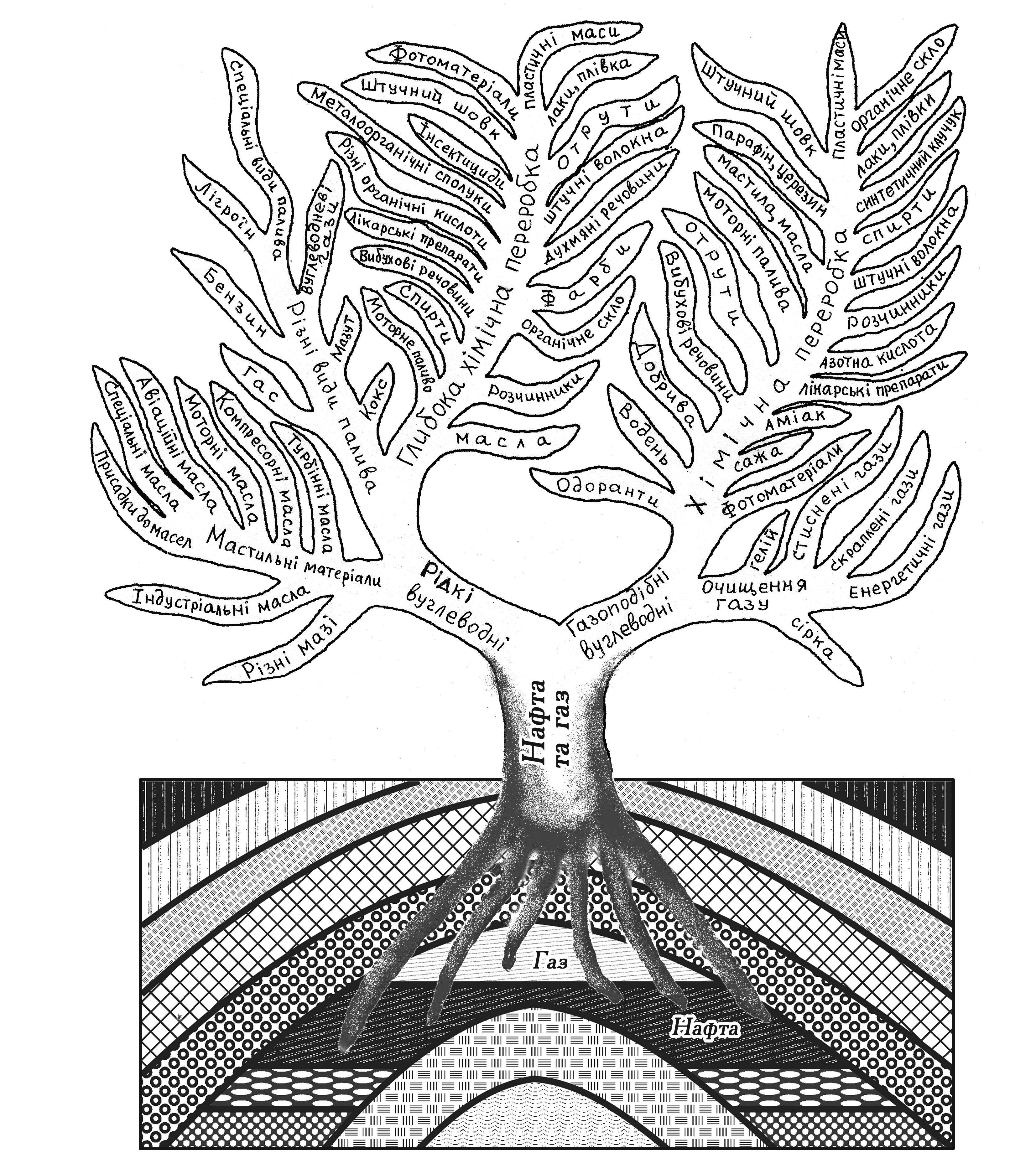 Дерево продуктів нафти (схема)